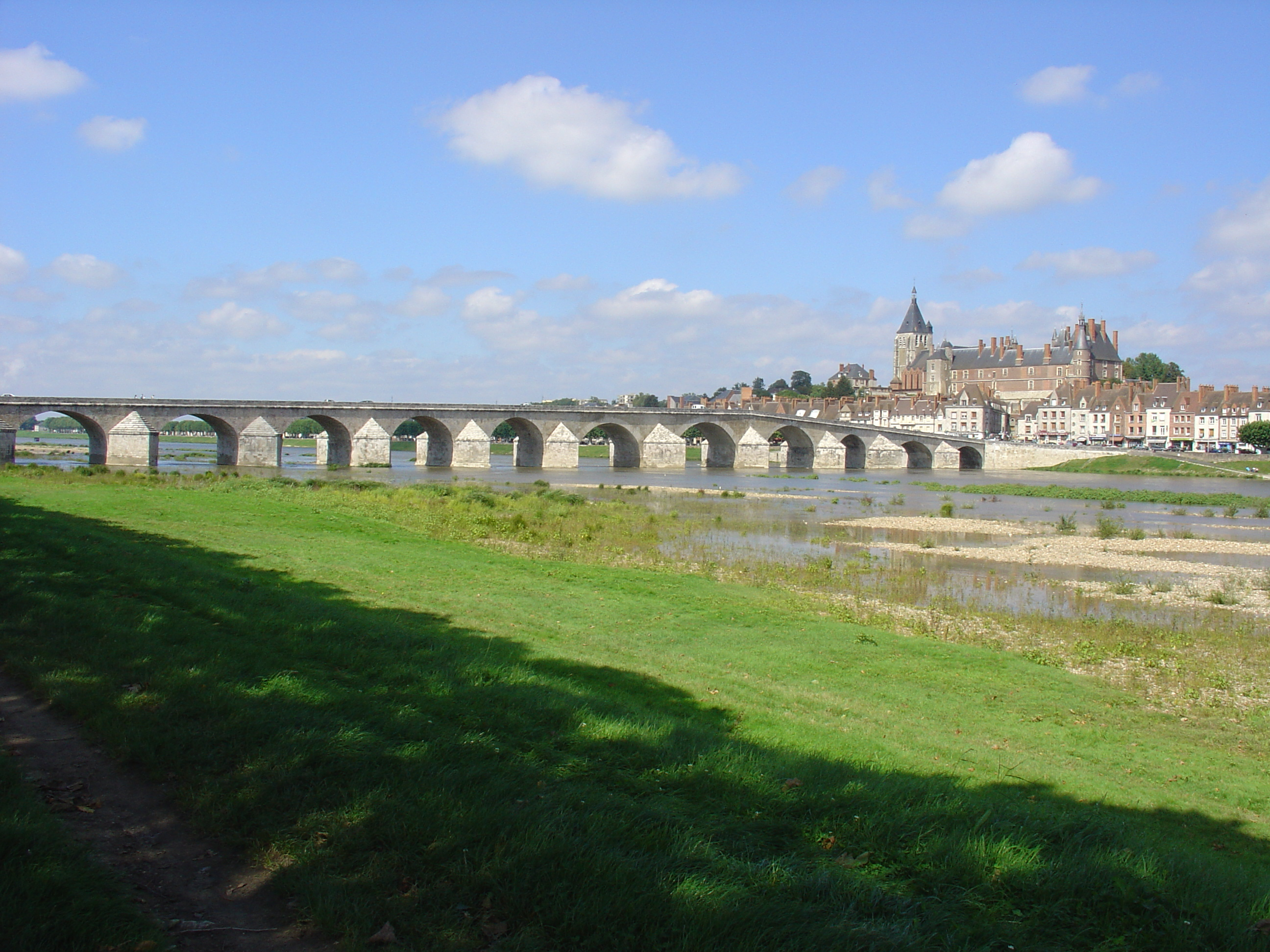 Gien